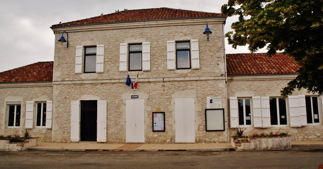 La Mairie